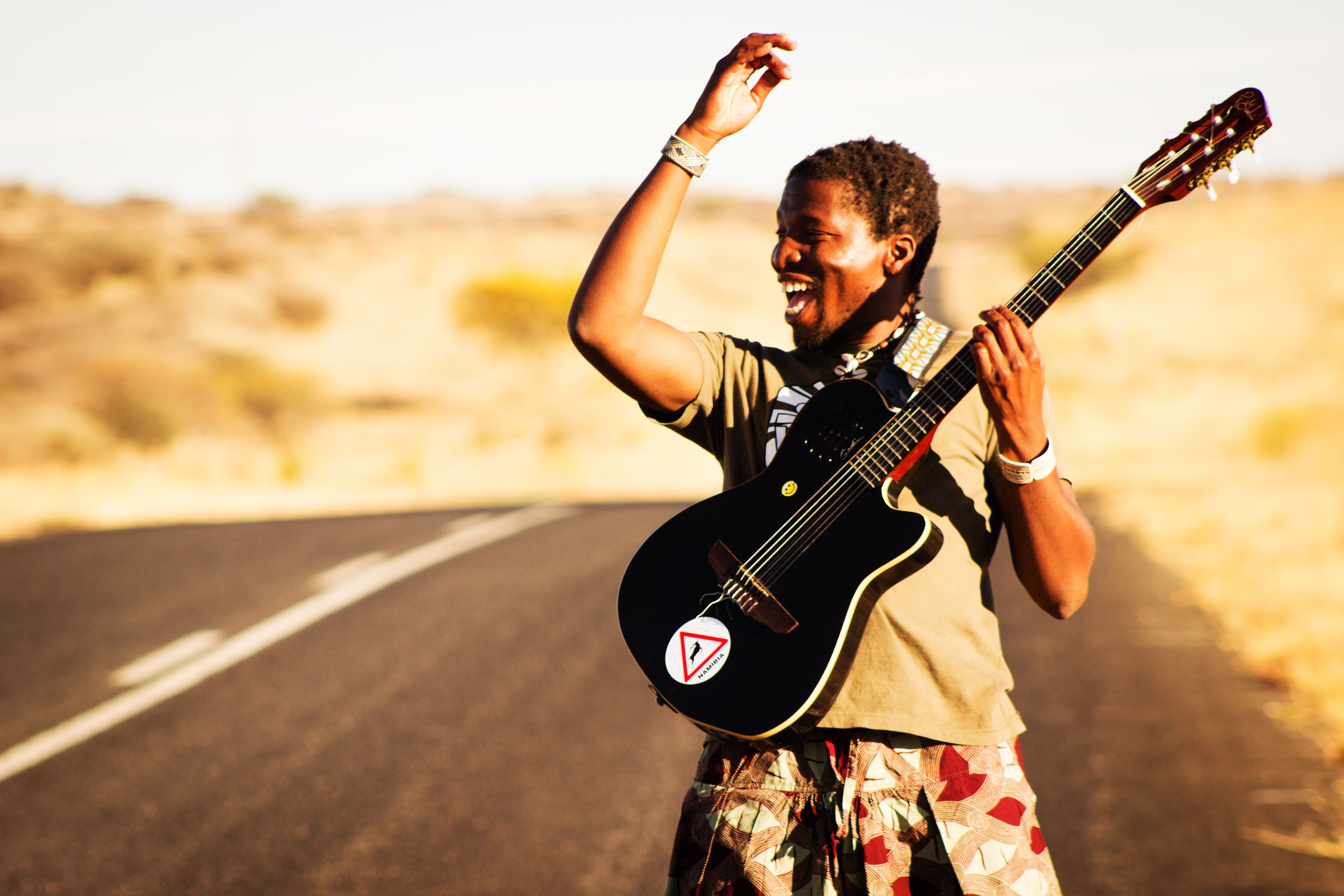 Elemotho Mgmt